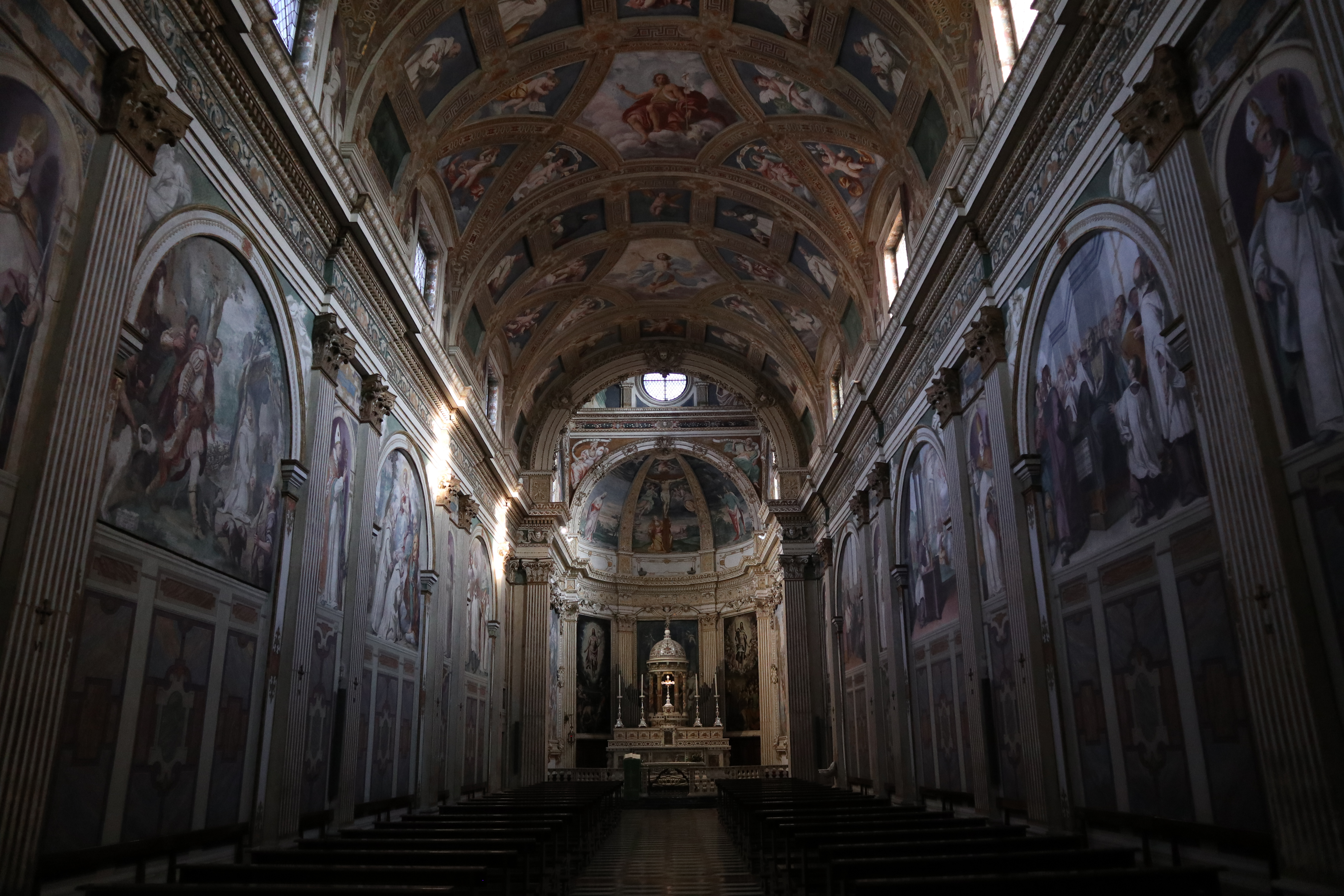 Interno